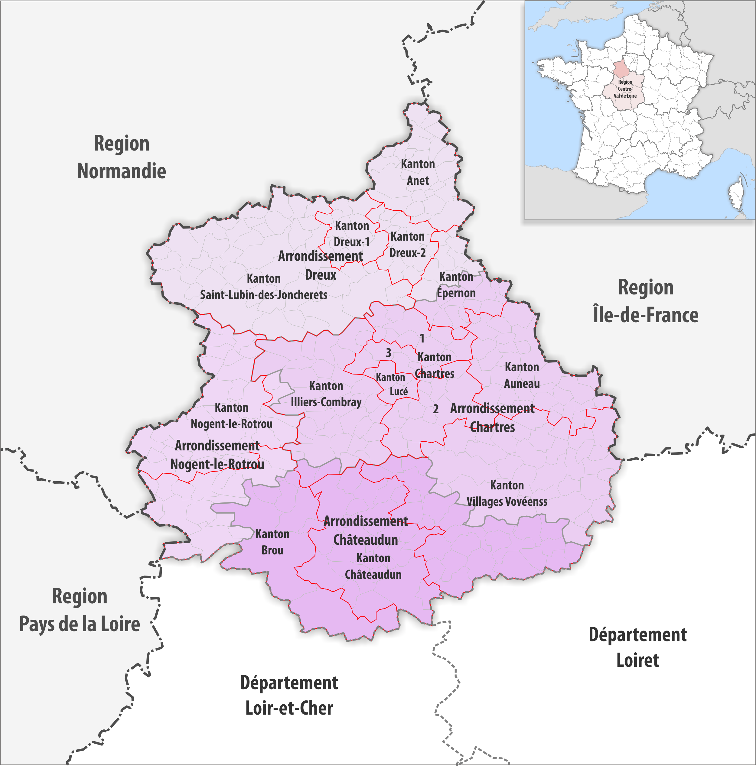 Gemeinden, Kantone und Arrondissemente im Departement Eure-et-Loir